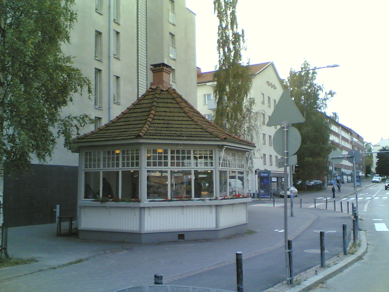 Kioski-Cafe Mutteri Lauttasaarentie 2